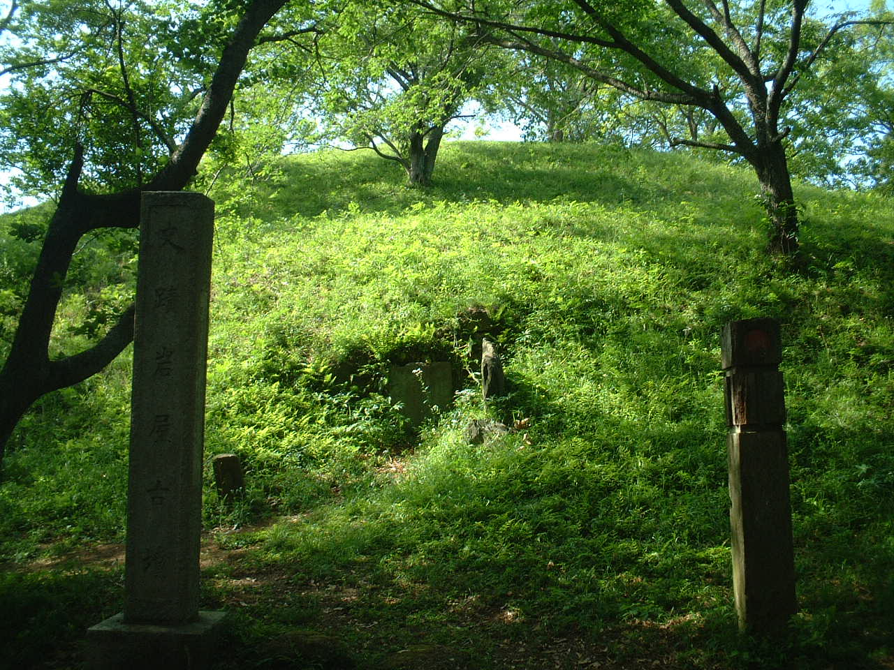 夏の龍角寺岩屋古墳